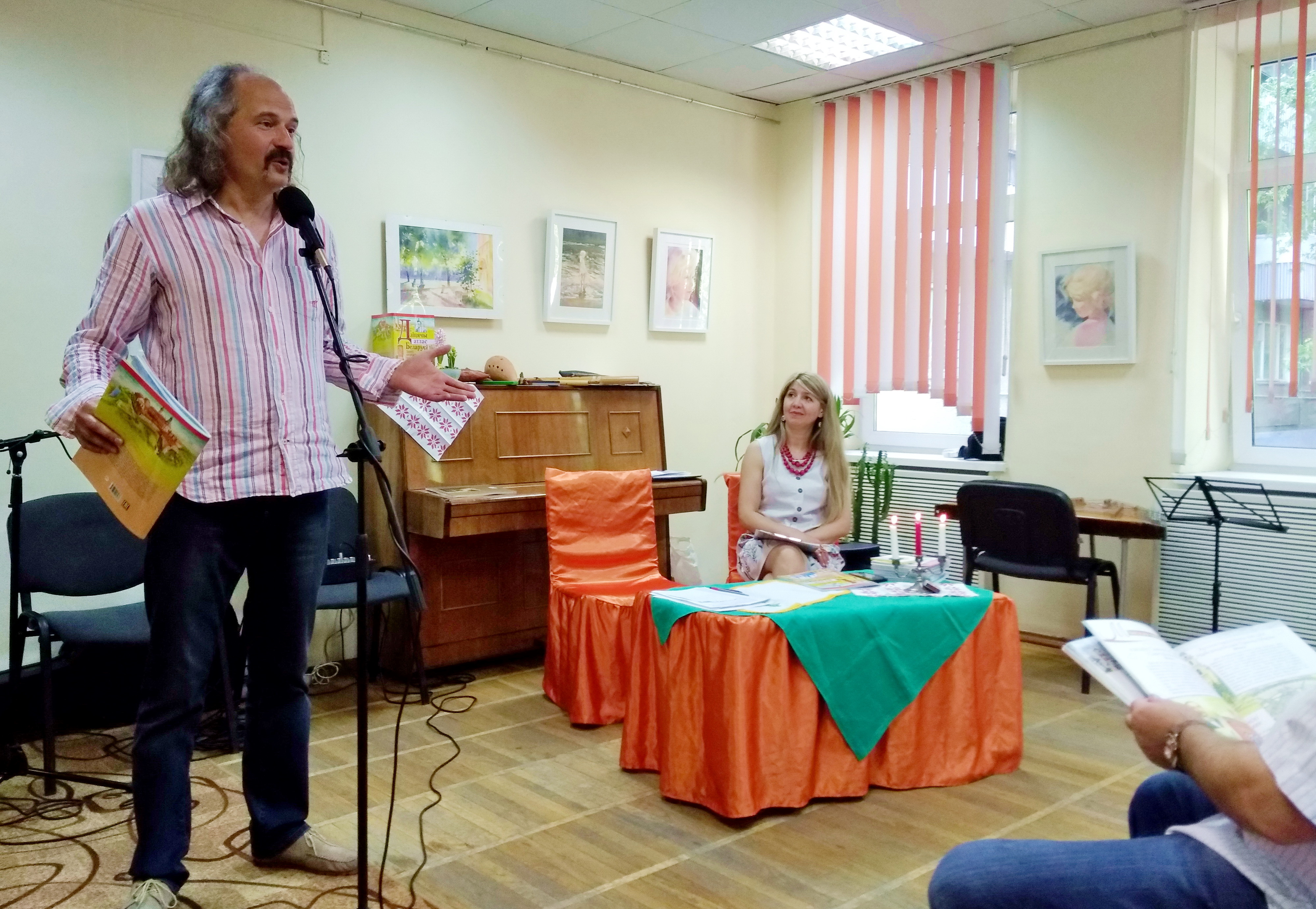 Прэзентацыя кнігі «Дзіцячы атлас Беларусі. Замкі, крэпасці, бажніцы». Бібліятэка ім. Цёткі, Мінск. Яраш Малішэўскі і Аксана Спрынчан